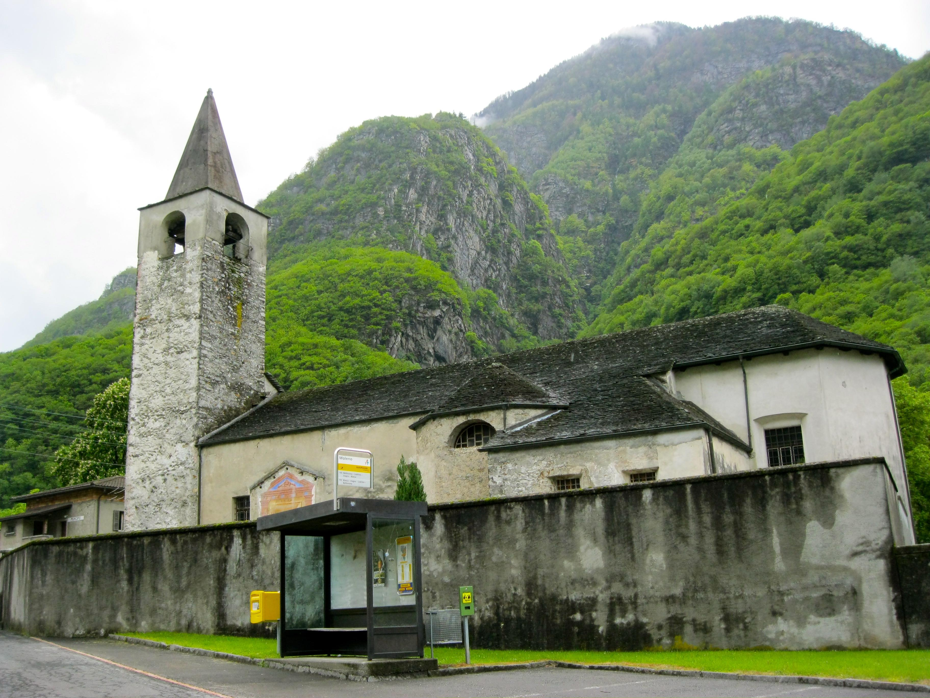 Chiesa di San Vittore il Moro a Moleno